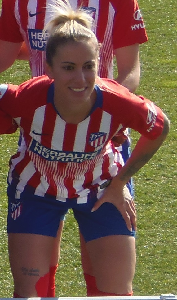 Ángela Sosa el 9 de febrero de 2019 antes de un partido con el Atlético de Madrid femenino